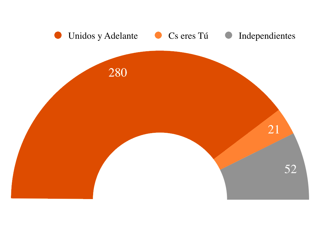 Número de Compromisarios obtenidos por cada candidatura en las primarias de Ciudadanos-Partido de la Ciudadanía en 2020